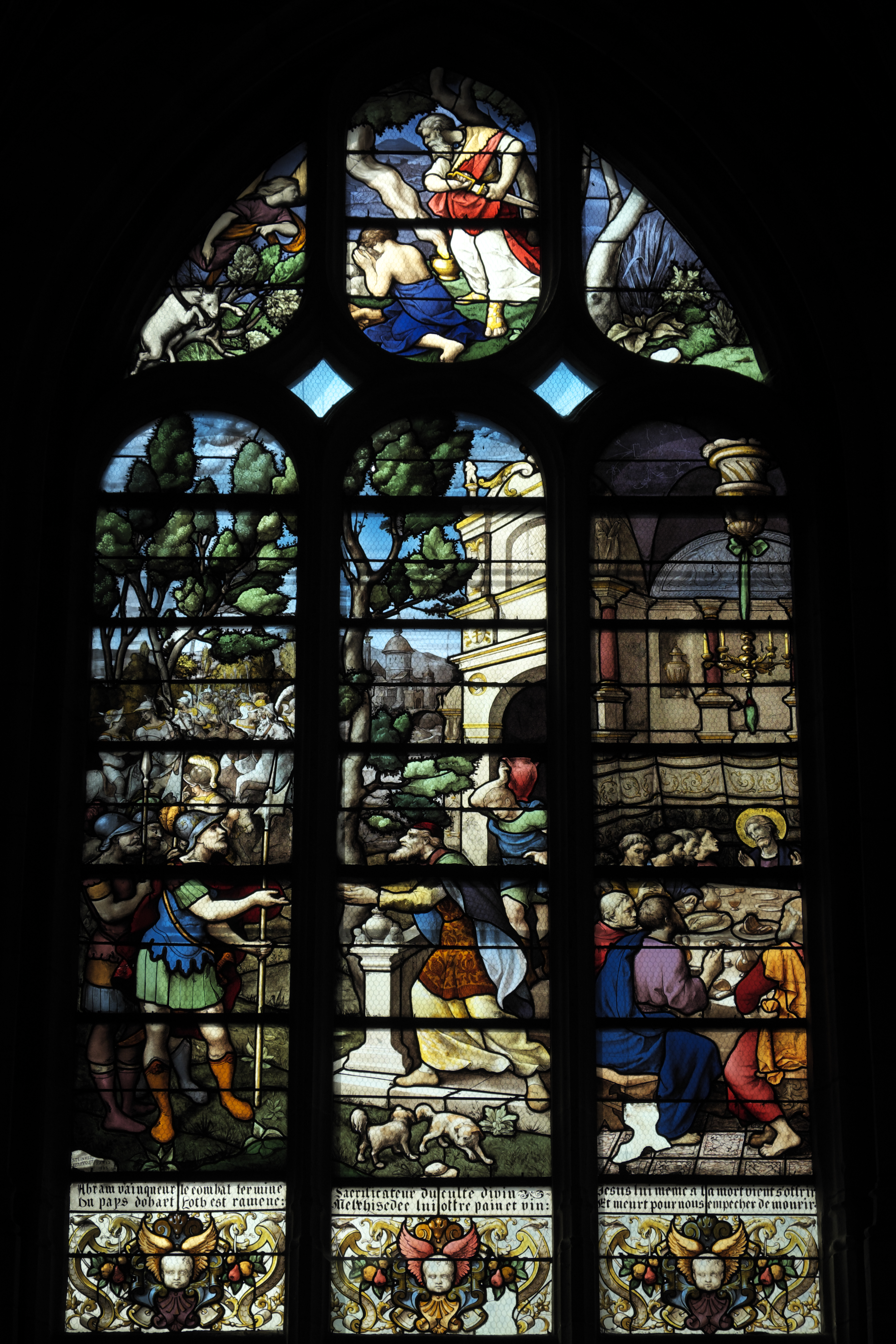 Katholische Kirche Sainte-Foy in Conches-en-Ouche im Département Eure (Haute-Normandie/Frankreich), Bleiglasfenster aus der 1. Hälfte des 16. Jahrhunderts; Darstellung: Abraham und Melchisedech